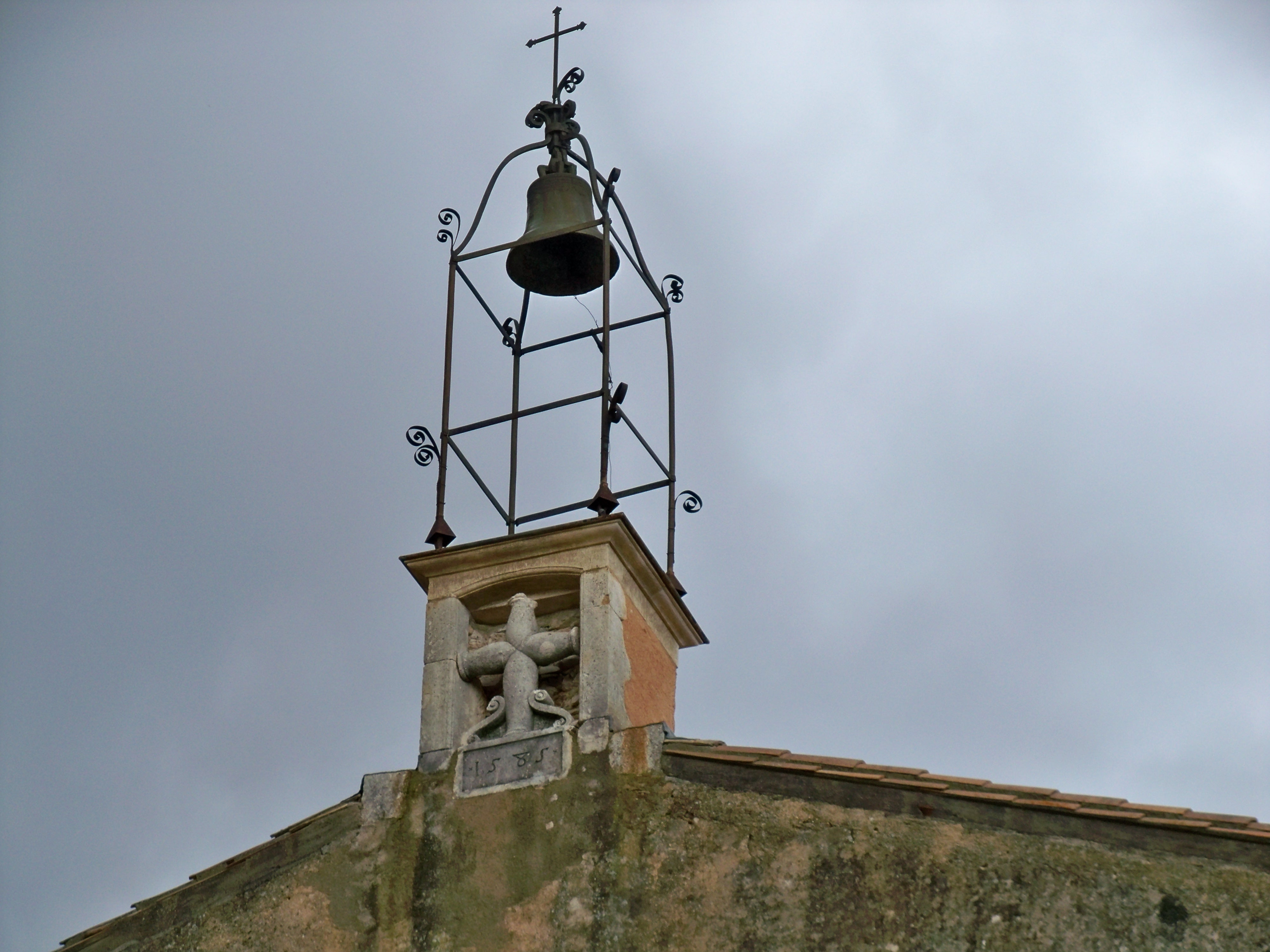 Clocher de l'église de Simiane la Rotonde (04)